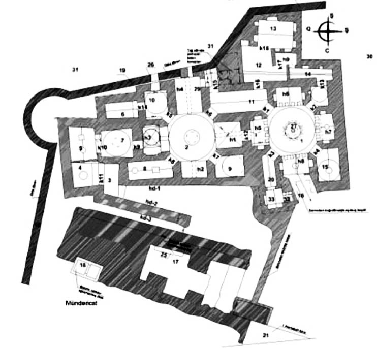 Bakı xan sarayı kompleksinə daxil olan yeraltı hamamın planı